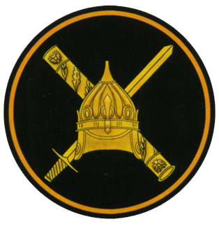 Нарукавная нашивка / Отдельные должностные лица, органы военного управления и организации Генерального штаба